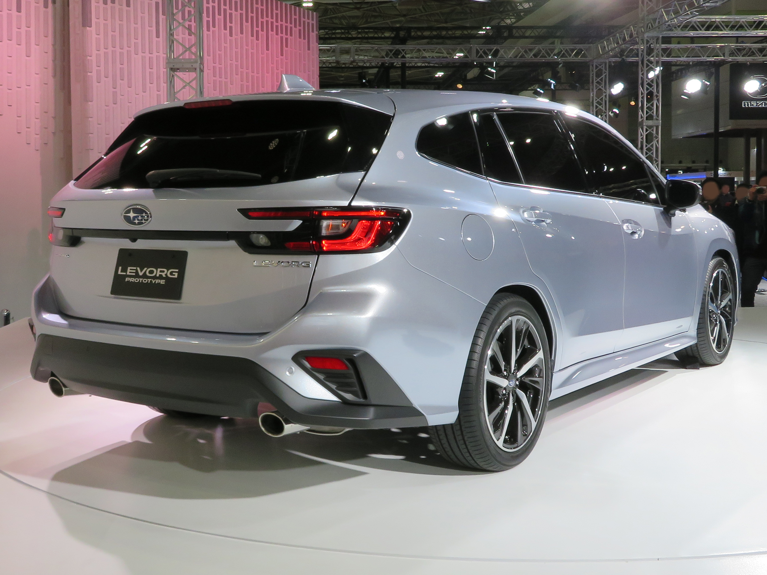 大阪モーターショー2019に於いてスバル・レヴォーグプロトタイプを撮影。